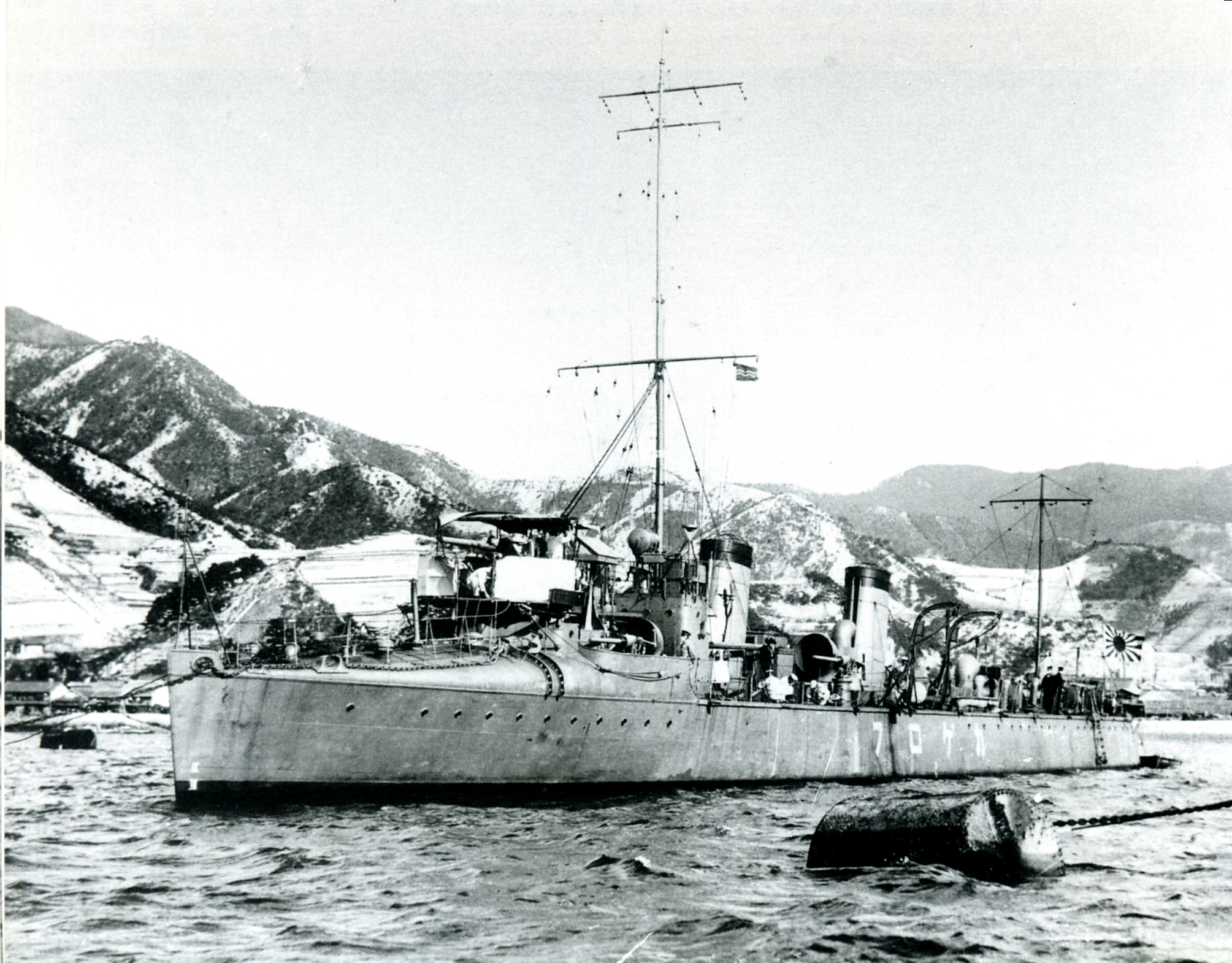 Japanese destroyer Kagero at Kure, 1920